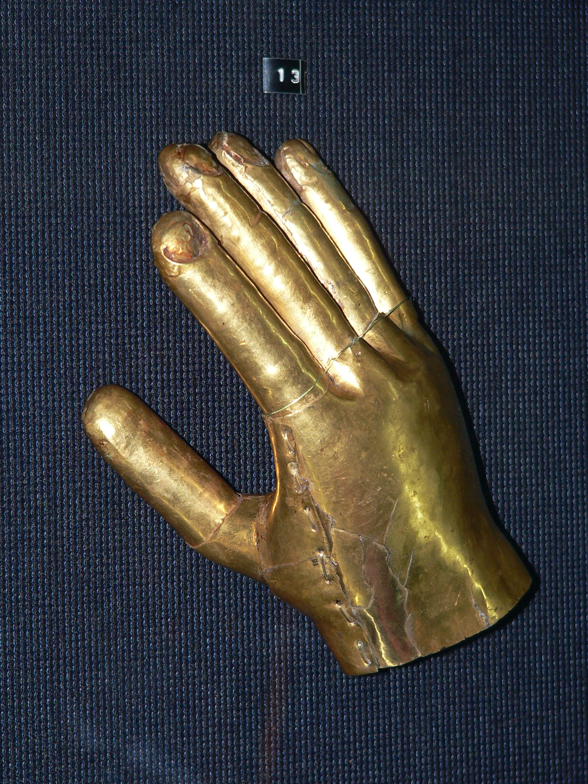 Descripción: Guante de oro Cultura: Lambayeque (800 – 1200 d.C.) Fundación: Fundación Miguel Mujica Gallo Museo: Museo Oro del Perú y Armas del Mundo Lugar: Lima, Perú Fotógrafo: © Manuel González Olaechea y Franco Fecha : 13 de julio de 2007